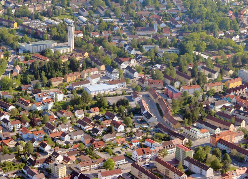 Luftaufnahme von Neugablonz aufgenommen bei einem Rundflug